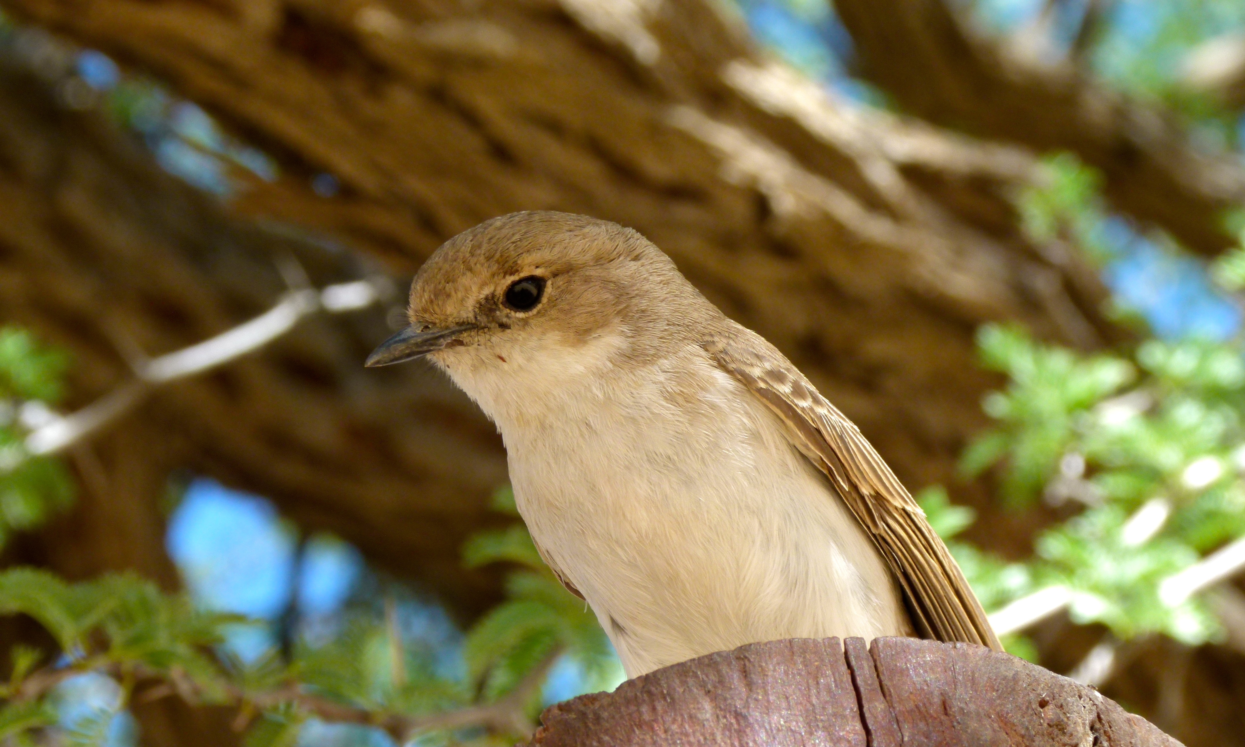 Dikbaardskolk Picnic Site, Kgalagadi Transfrontier Park, SOUTH AFRICA